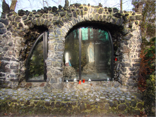 Gemeentelijk monument in Bredevoort (Netherlands)